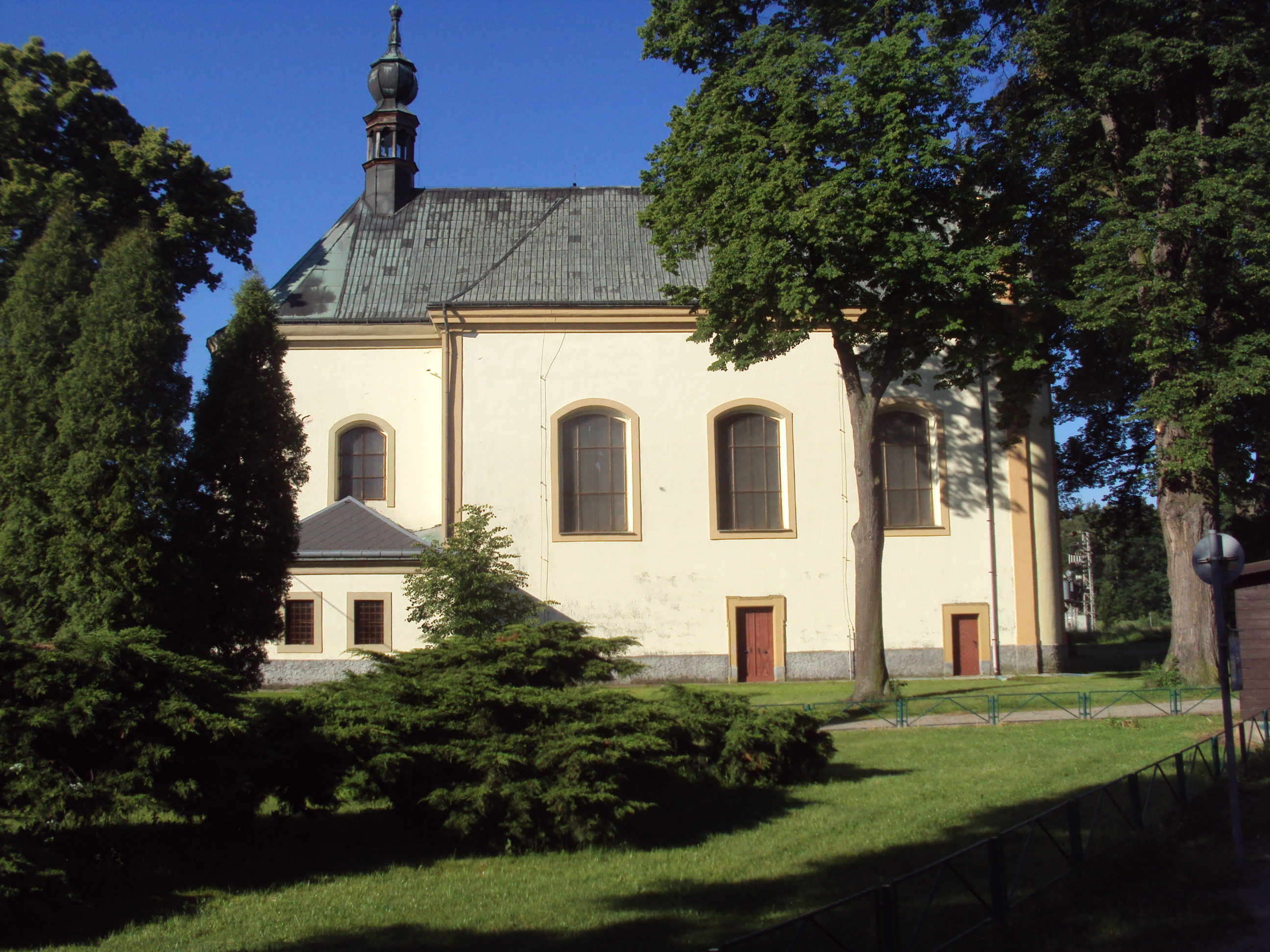 Kostel svatého Ondřeje v Jestřebí